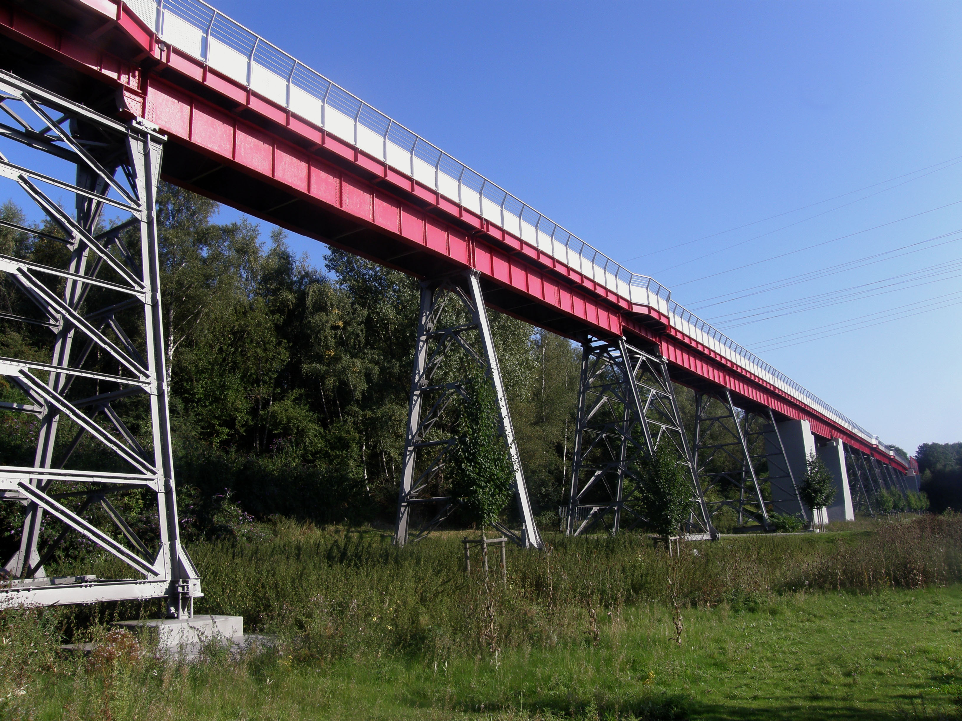 Pfeilerbrücke von Nordwesten gesehen, etwa 2/3 der gesamten Brückenlänge